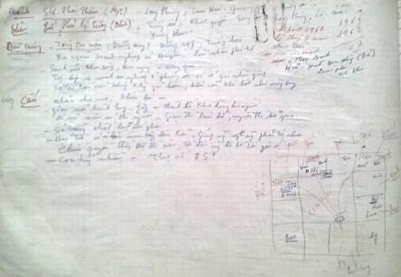 Comment De Gaulle